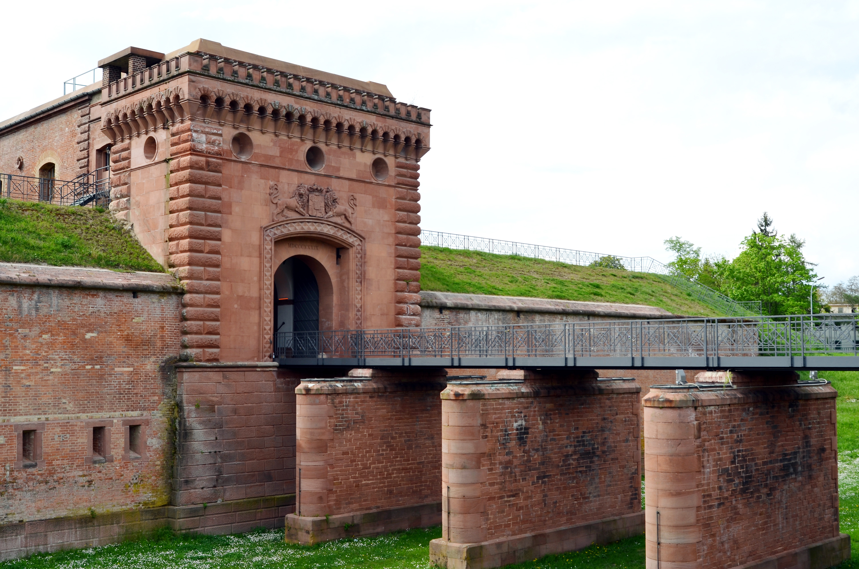 Germersheim, Weißenburger Tor